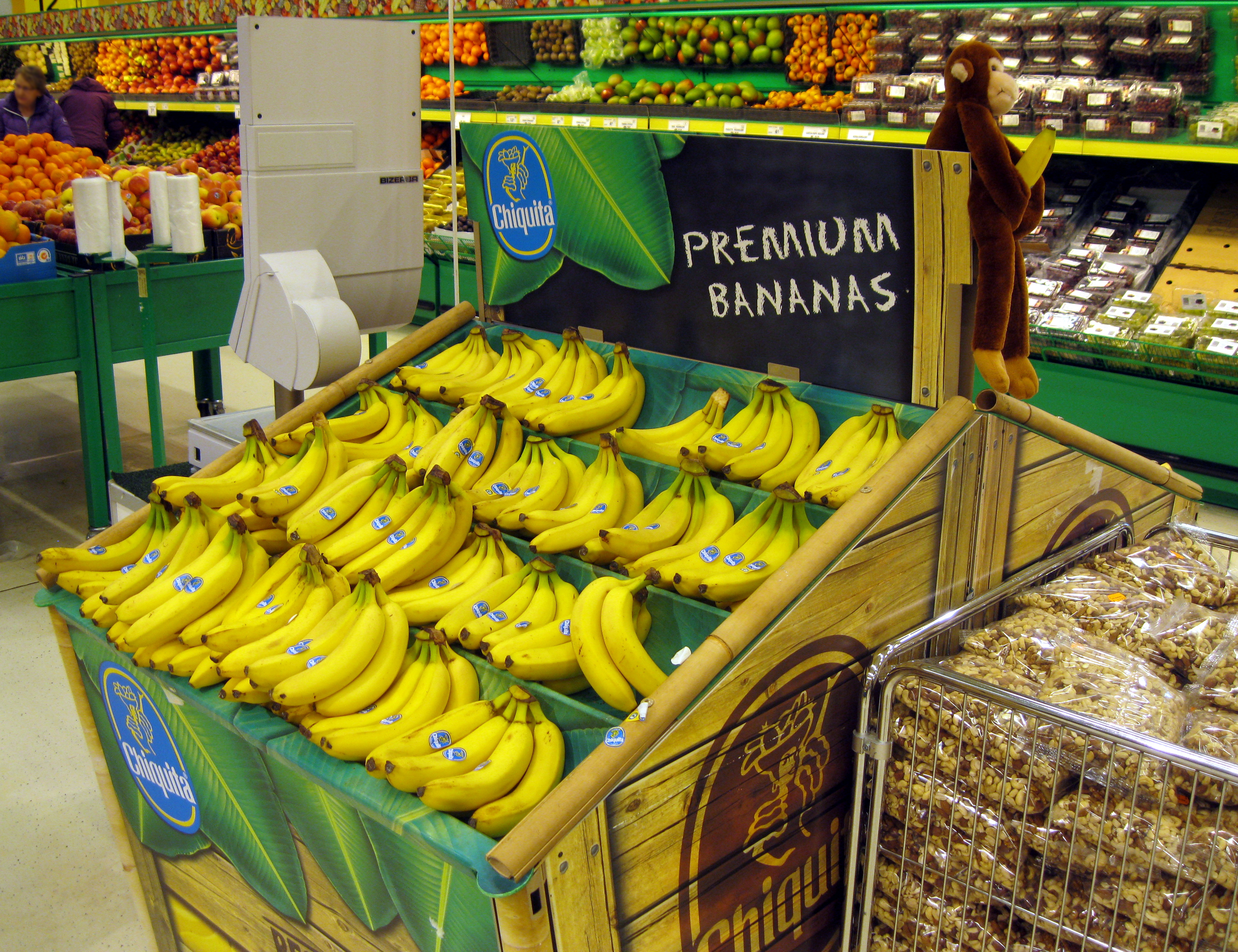 Chiquitan banaanihylly ruokakaupassa.